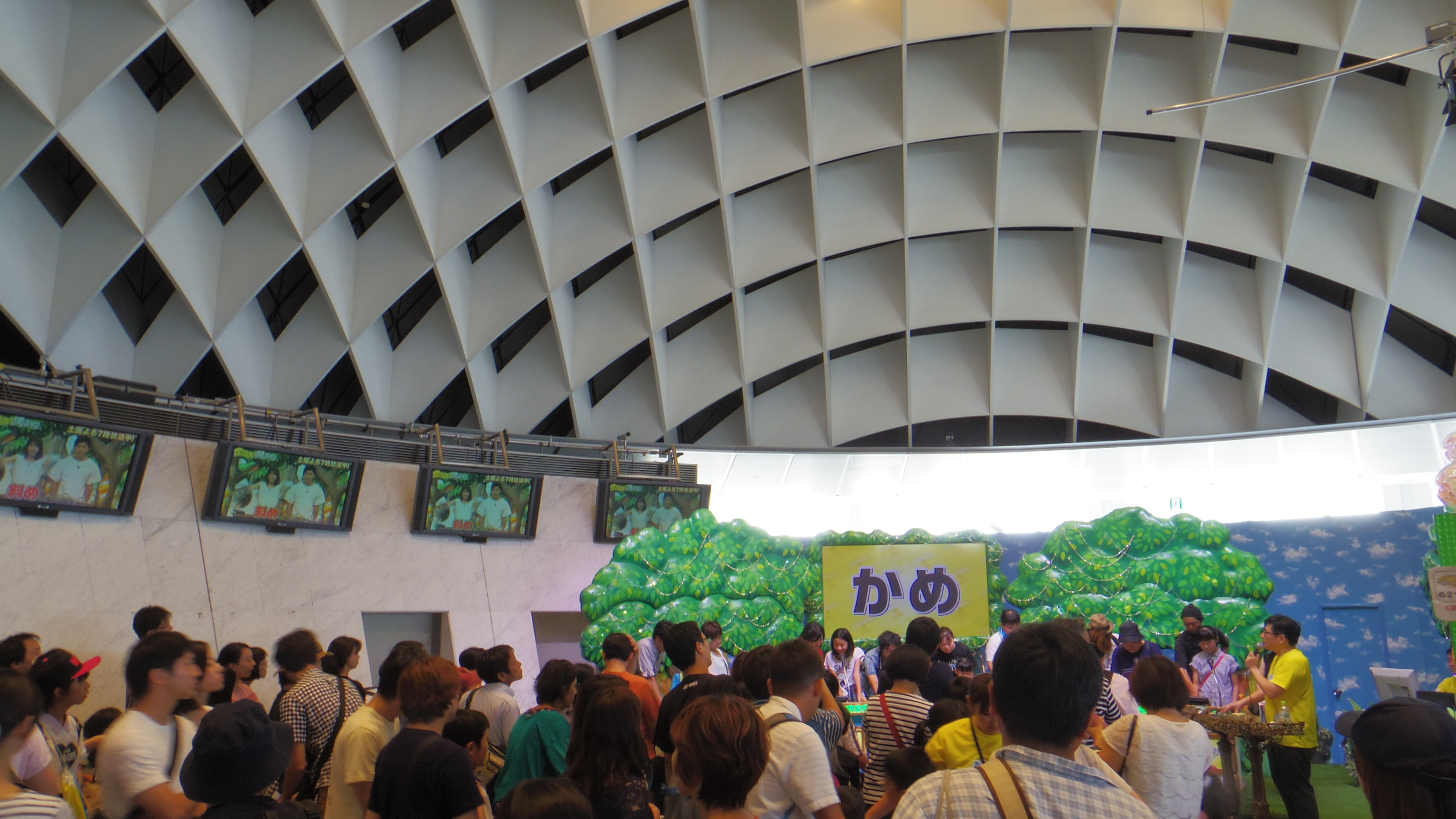 フジテレビの夏イベント「お台場みんなの夢大陸2017」より。同局系で放送のクイズ番組『金の正解!銀の正解!』のブース。2017年8月27日、フジテレビ本社屋25階球体展望室「はちたま」で撮影。